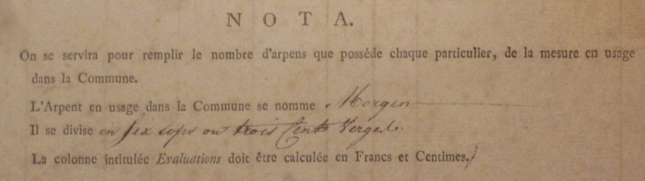 L'Arpent en usage dans La Commune (d'Eindhoven) se Nomme: MORGEN Il de devise en six lops ou trois cent Vergee